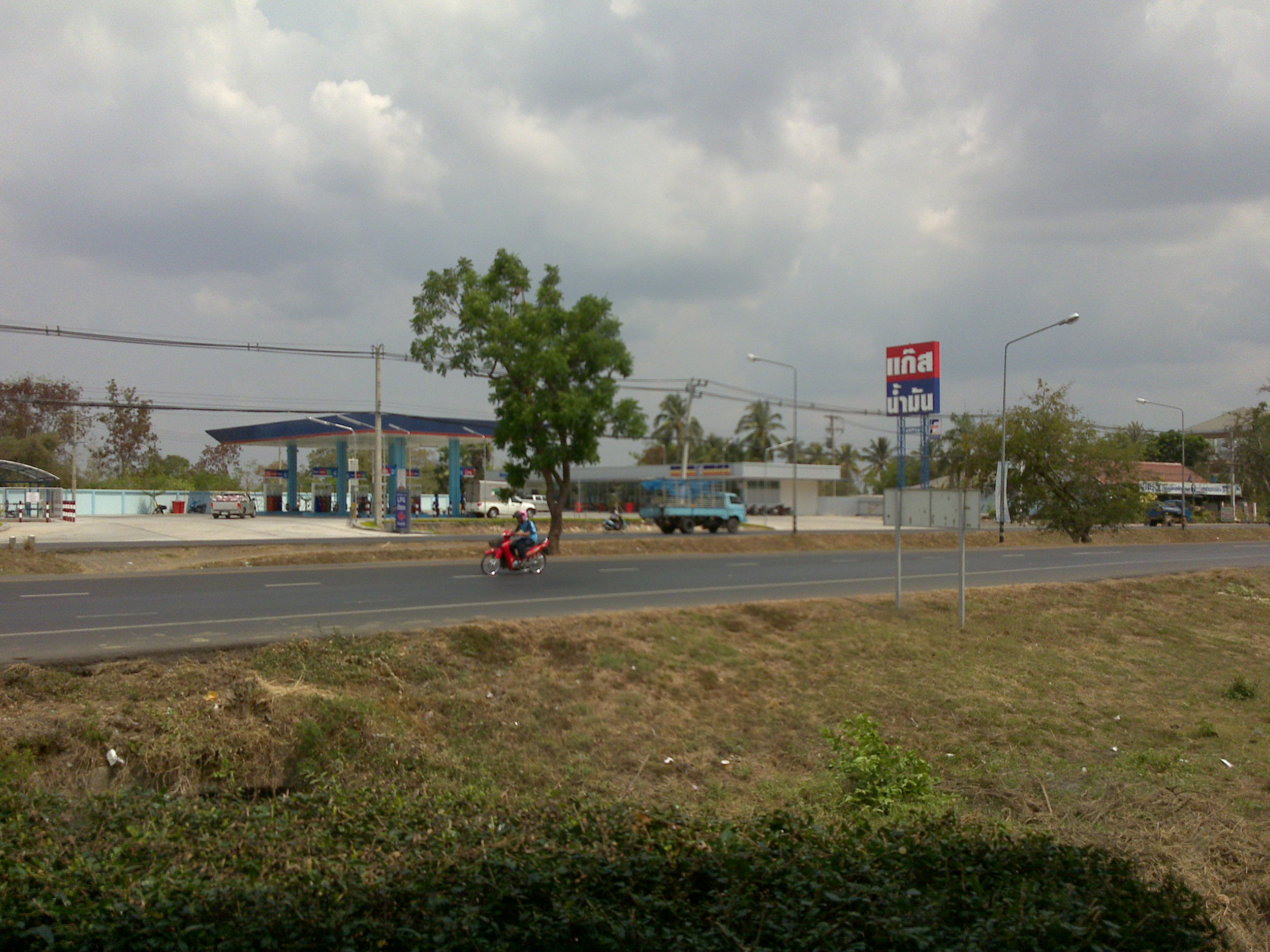 ทางหลวงแผ่นดินหมายเลข 24 อำเภอนางรอง จ.บุรีรัมย์